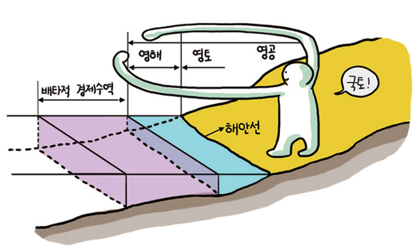 국토는 주권이 미치는 범위로 영토, 영해, 영공을 포함한다는 내용을 도식화하여 표현한 그림